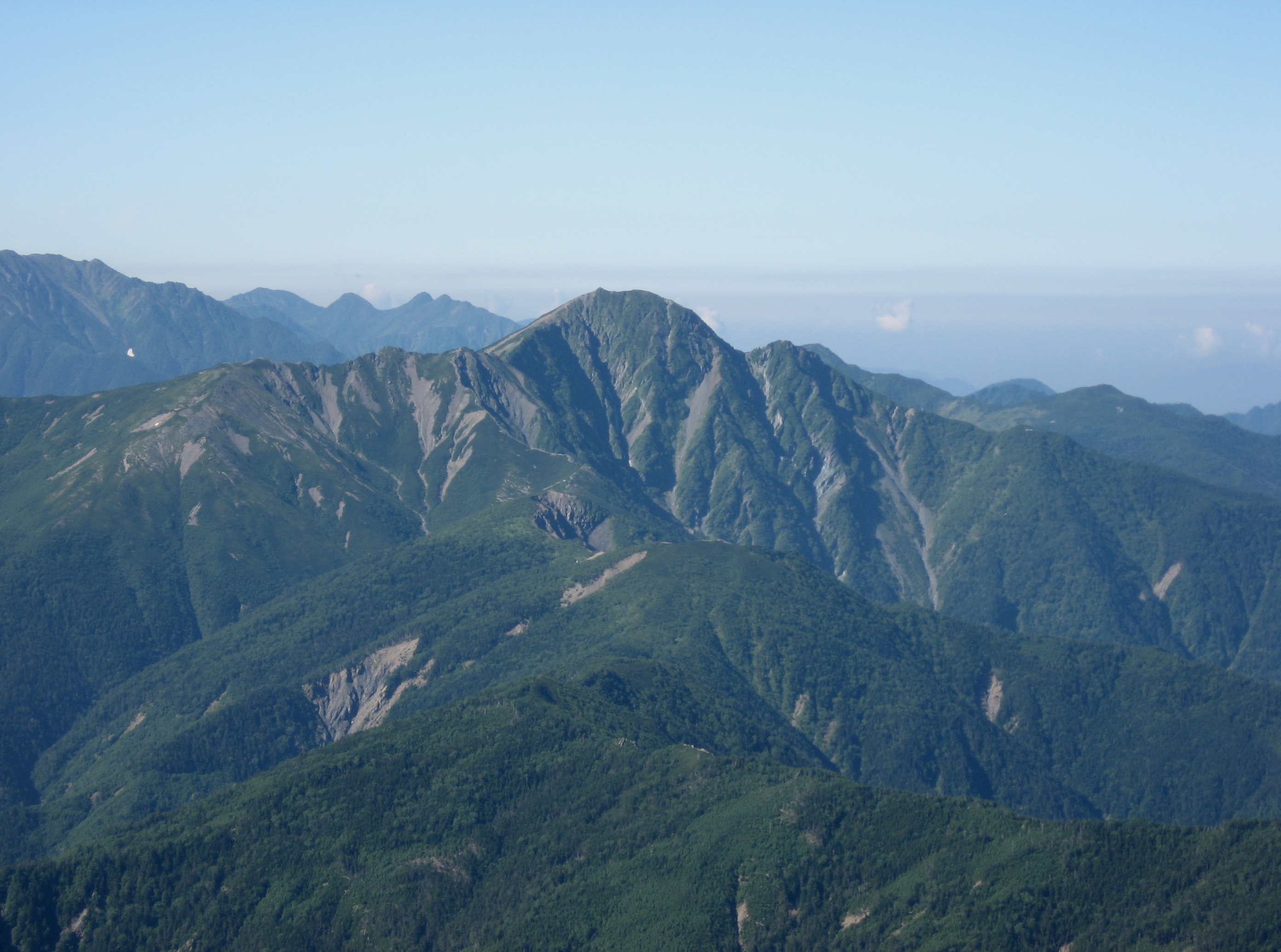 間ノ岳より塩見岳